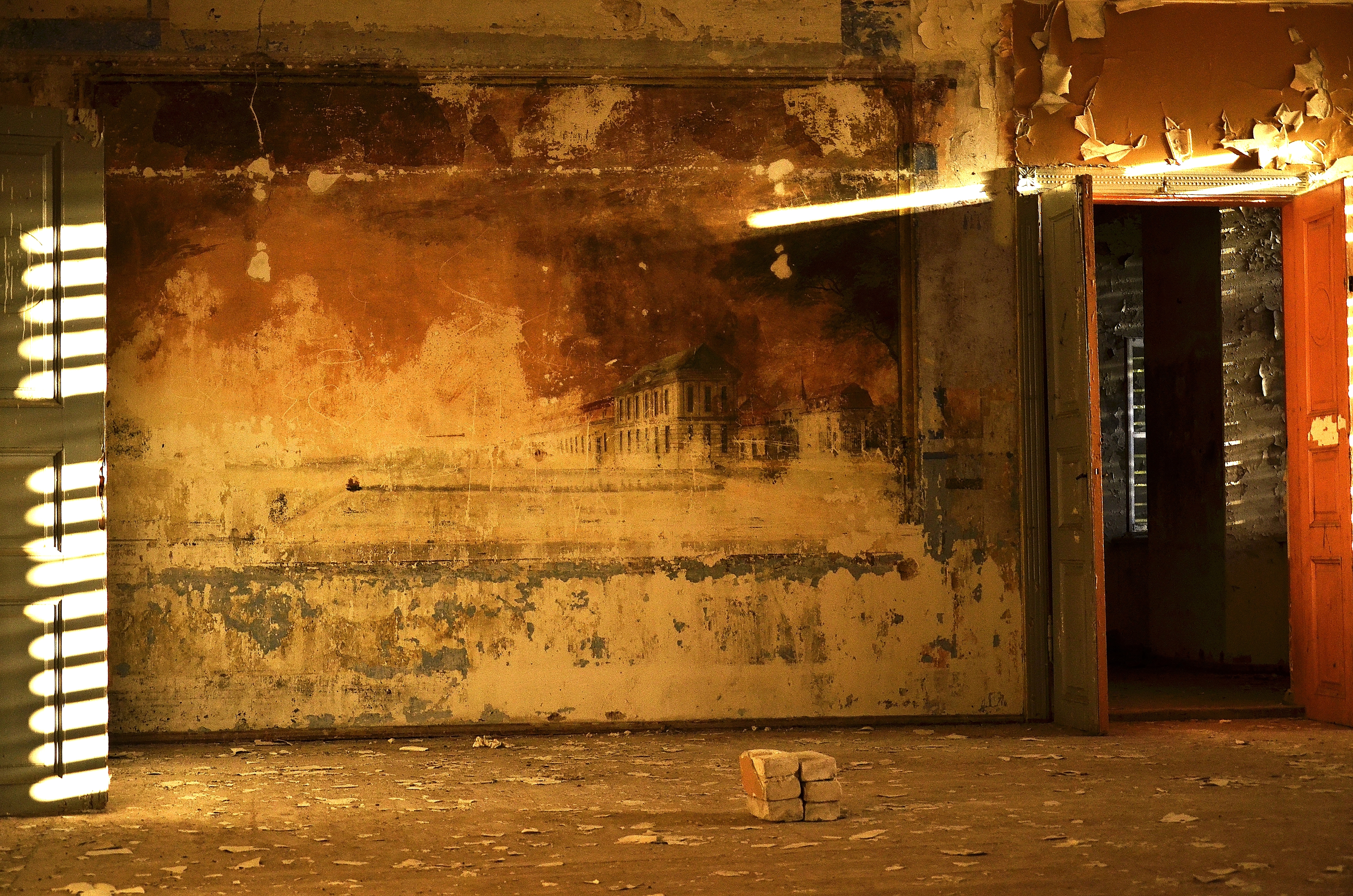 Purila mõisa peahoone. Purila mõisa seinamaal, mis kujutas toonase mõisaomaniku linnamaja Tallinnas.